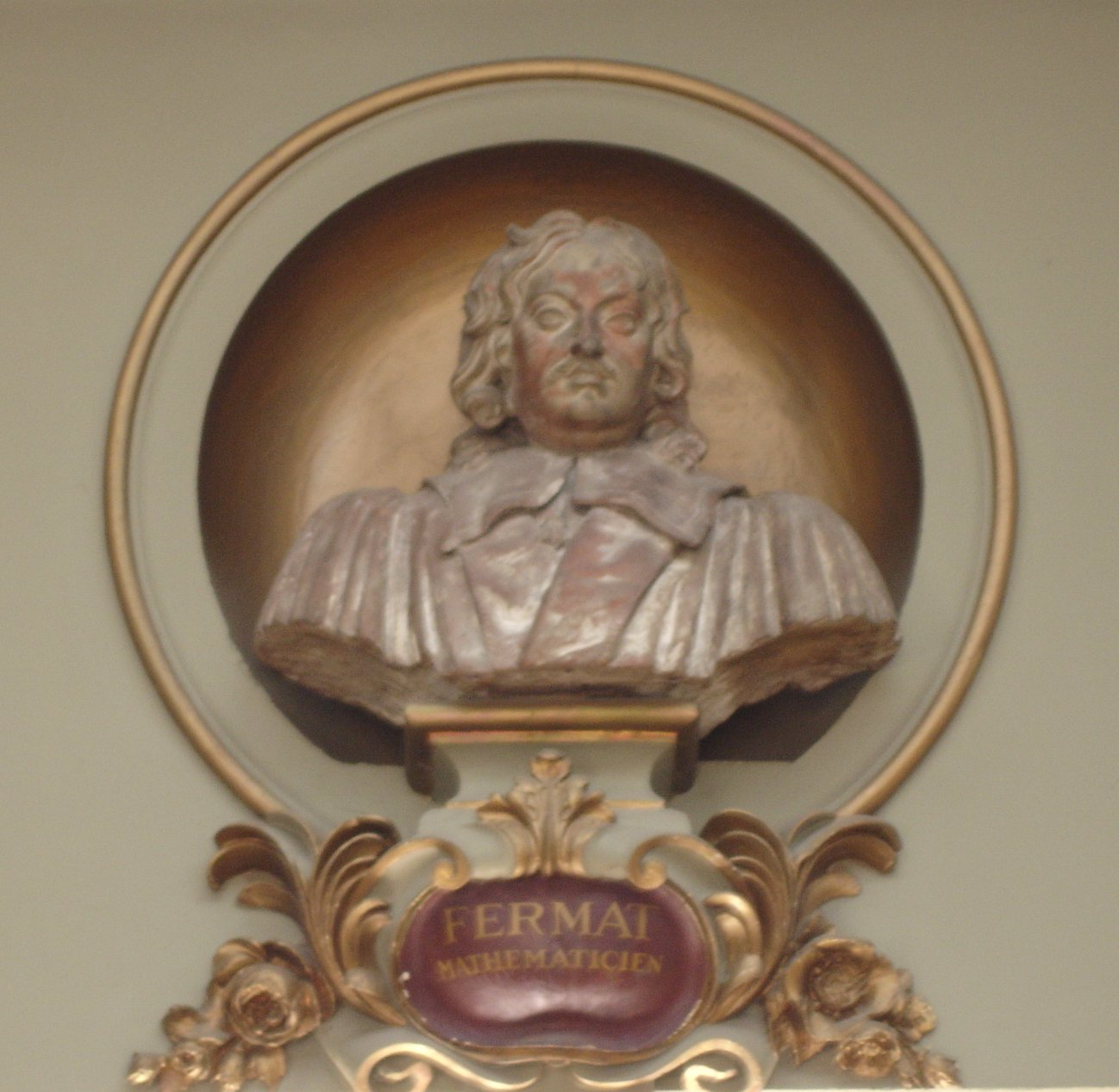 France, Haute-Garonne (31), Toulouse, salles des Illustres du Capitole, Pierre de Fermat.